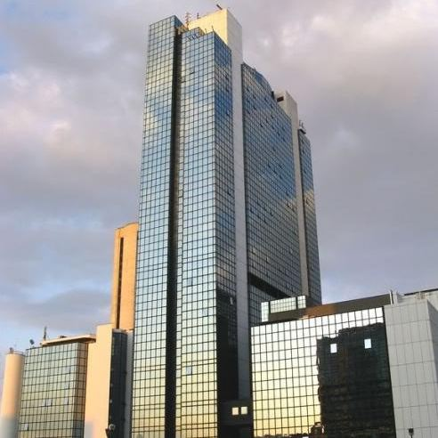 Torre Telecom Centro Direzionale Napoli